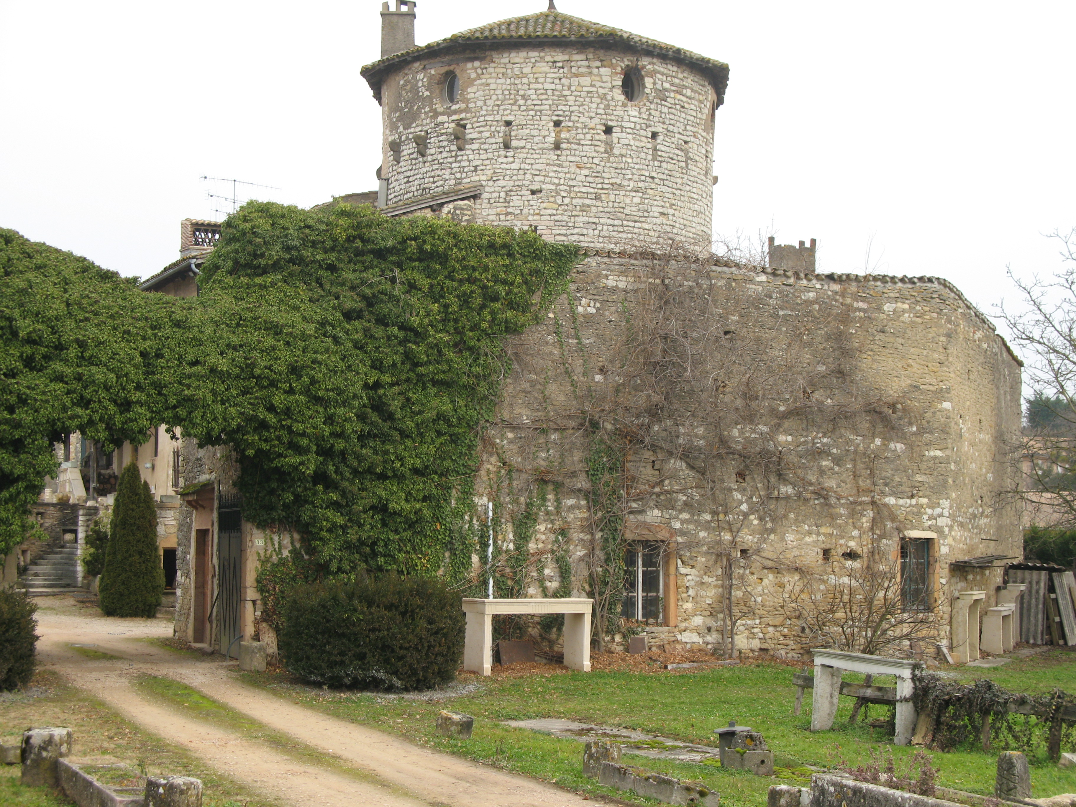 château du Parc - Sancé (Saône-et-Loire)